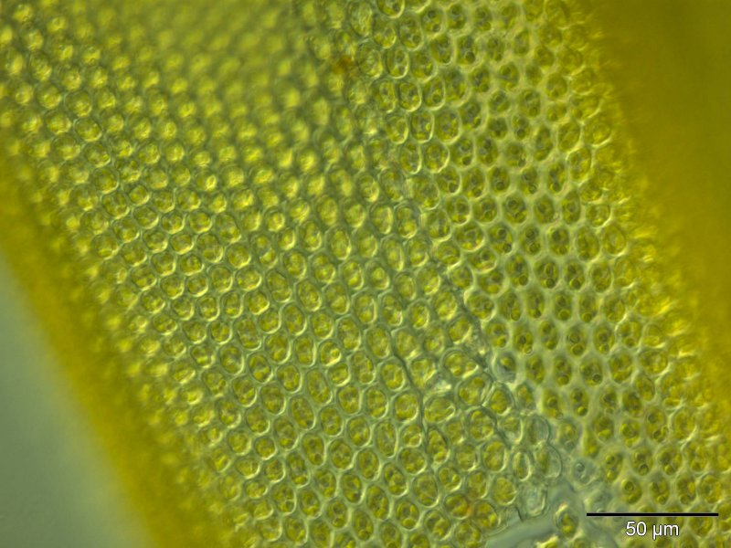 Stein-Goldhaarmoos (Orthotrichum anomalum), Laminazellen, 400x vergrößert